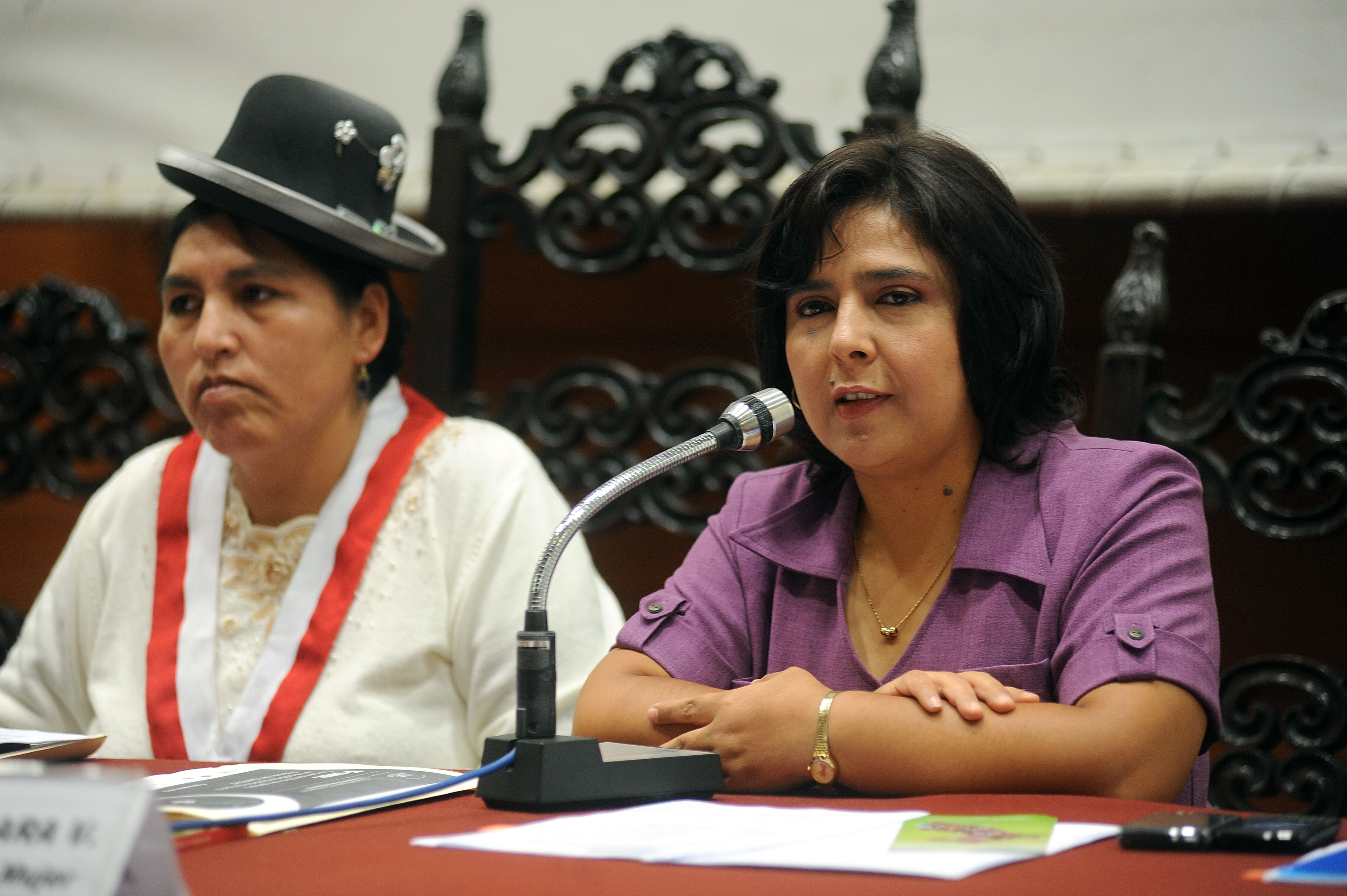 La congresista Claudia Coari Mamani se dirige a los presentes durante un evento por el Día Internacional de la Mujer realizado hoy en el auditorio Faustino Sánchez Carrión del Congreso. Al encuentro asistió también la ministra de la Mujer y congresista, Ana Jara Velásquez, y también fue invitada la parlamentaria y vicepresidenta de la República, Marisol Espinoza Cruz.